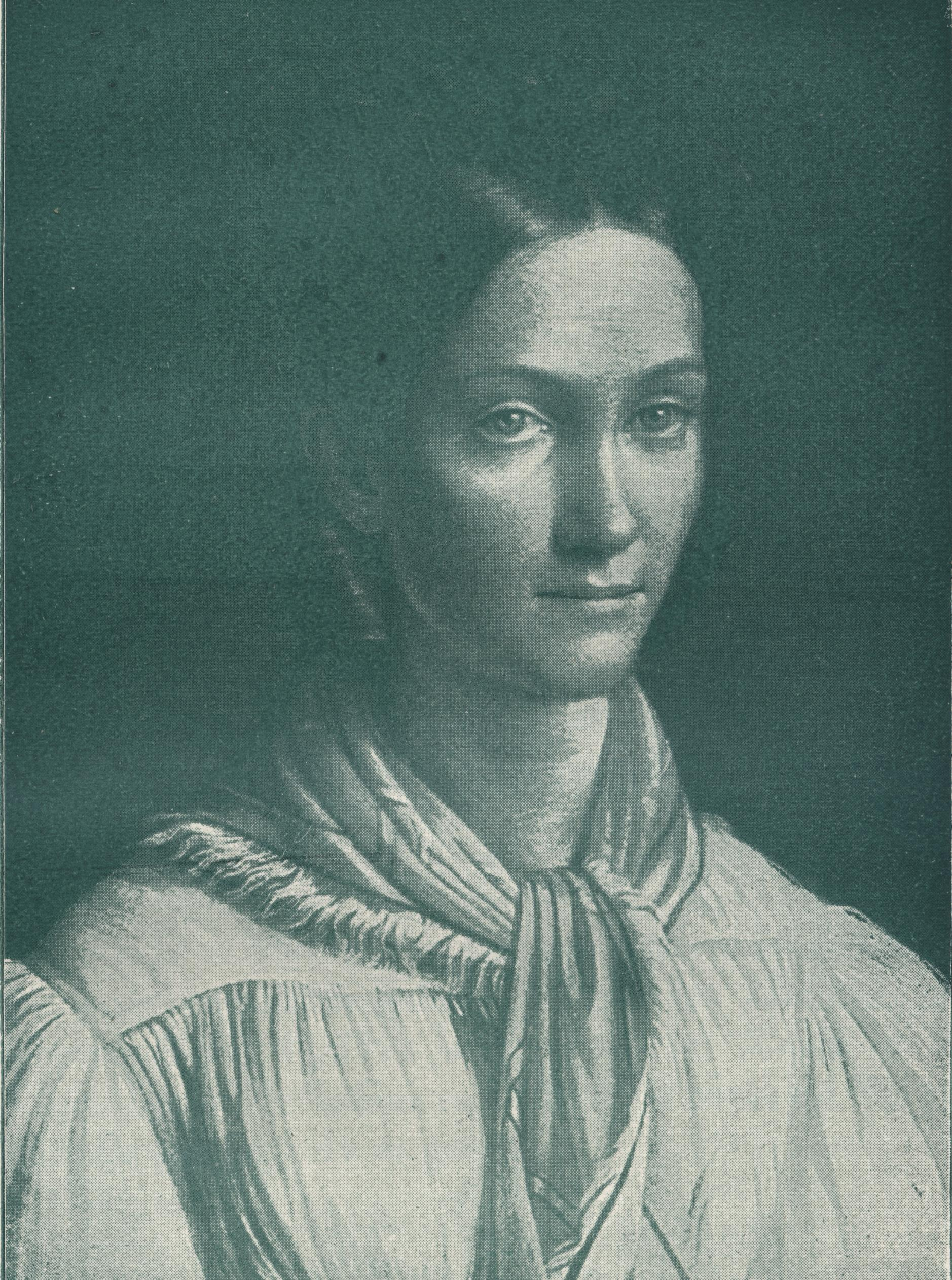 Bildnis Marie Zeller (1807–1847), geb. Reimer, Ehefrau von Albert Zeller